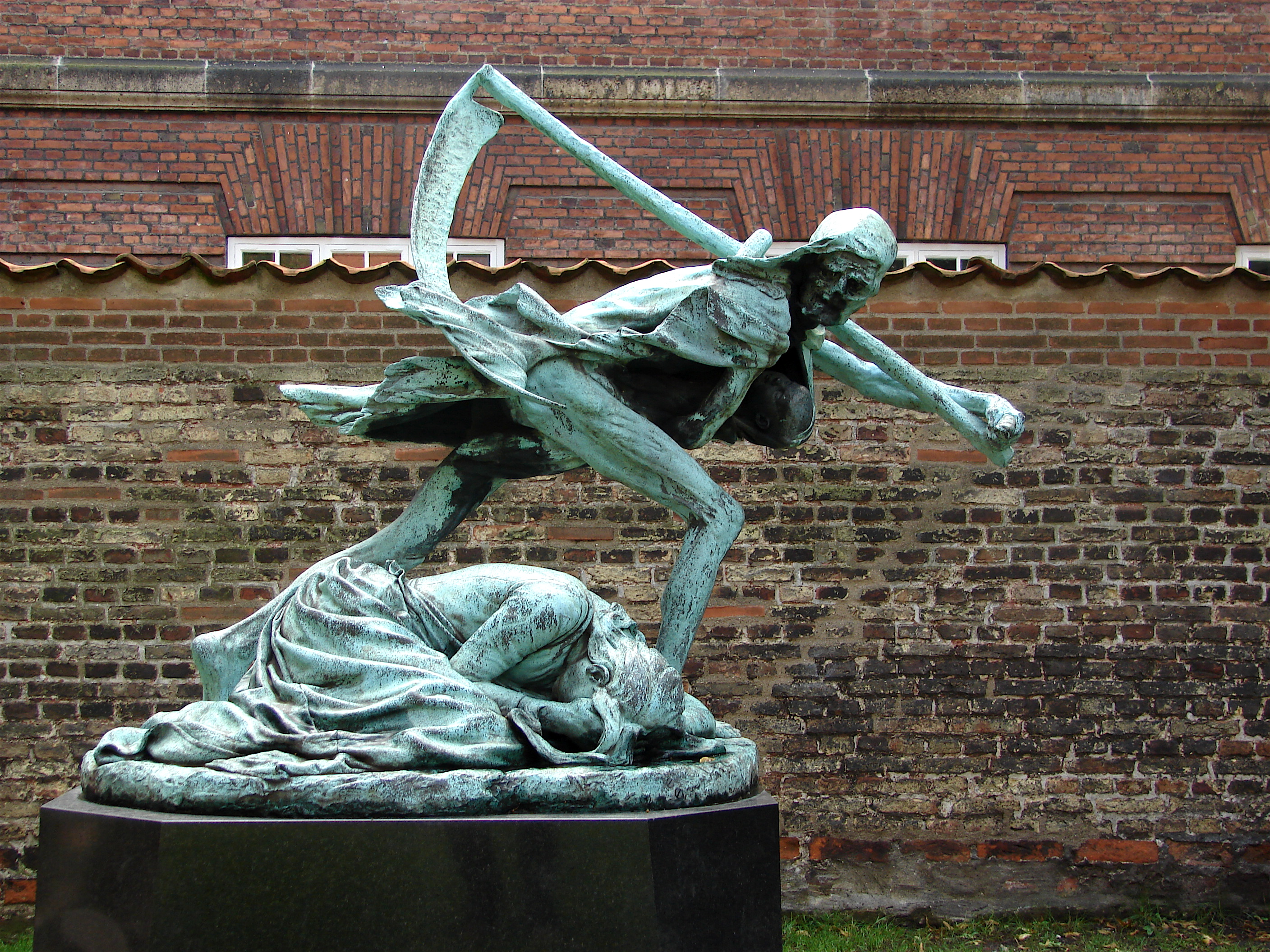 Døden og moderen, Niels Hansen Jacobsen, København